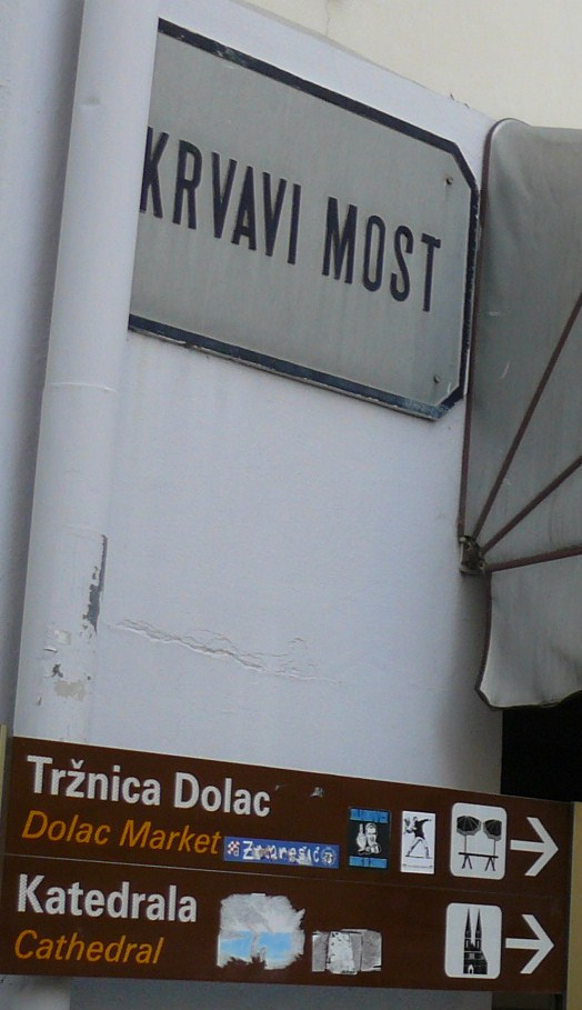 Krvavi Most street, Zagreb.